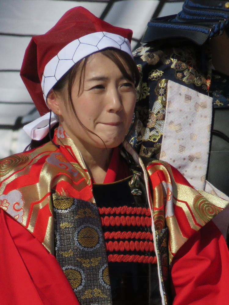 将棋棋士の岩根忍（平成３０年１１月、姫路市で行われた人間将棋にて）